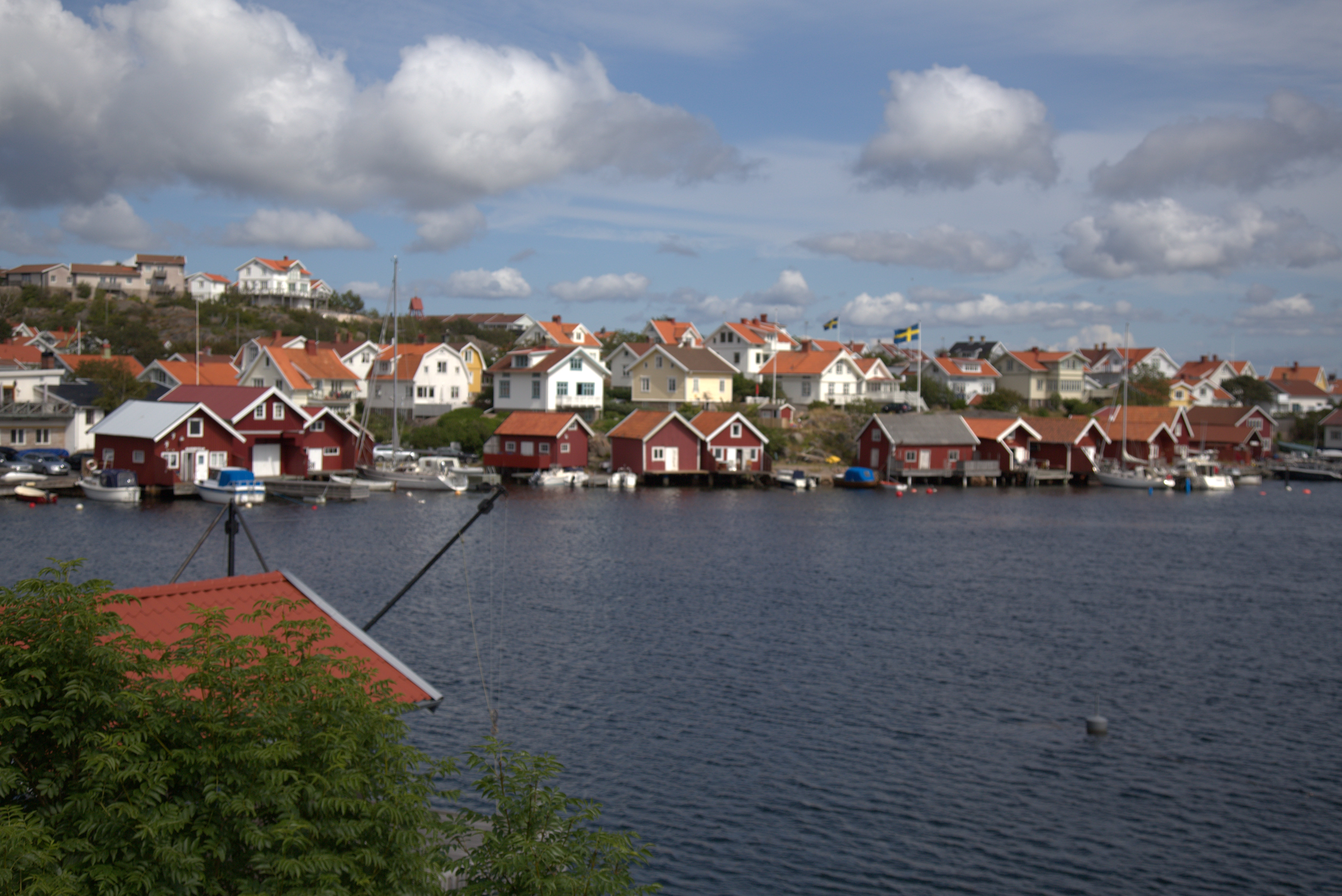 Hovenäset, vy från Hallindenvägen.